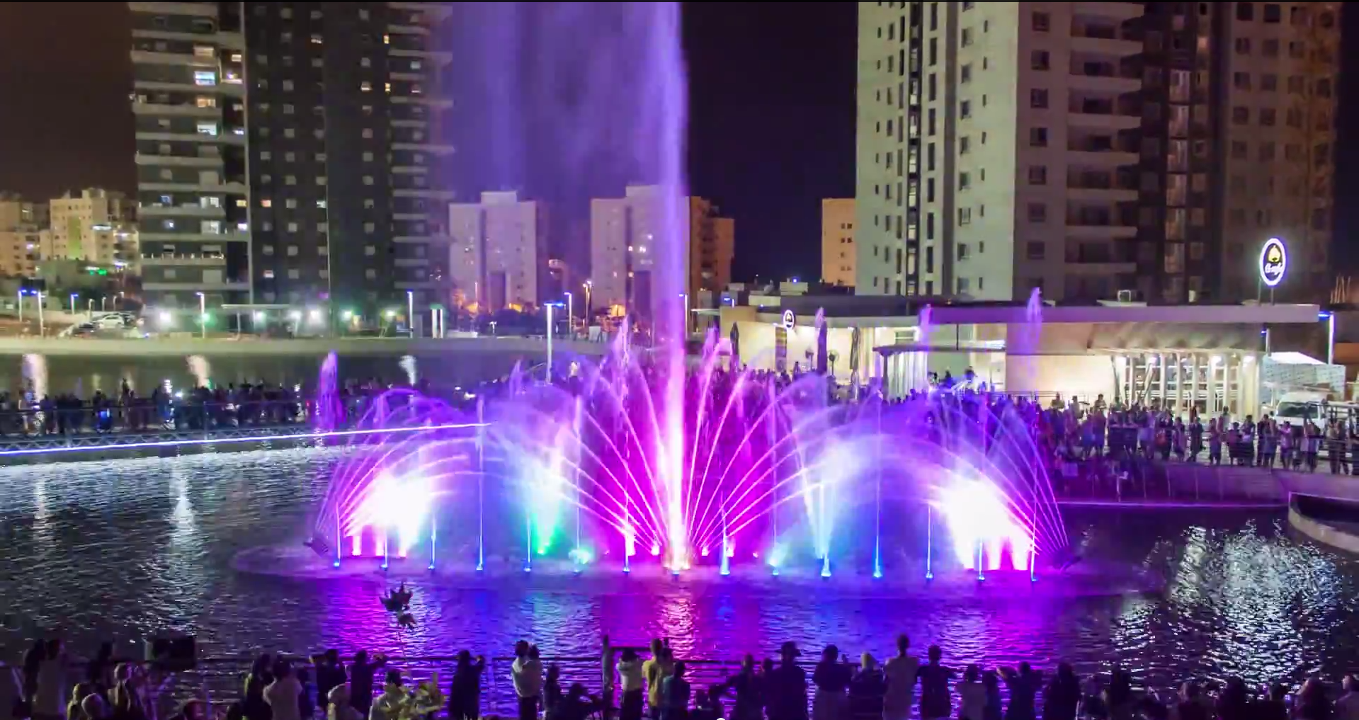 המזרקה המוזיקלית בפארק אשדוד-ים